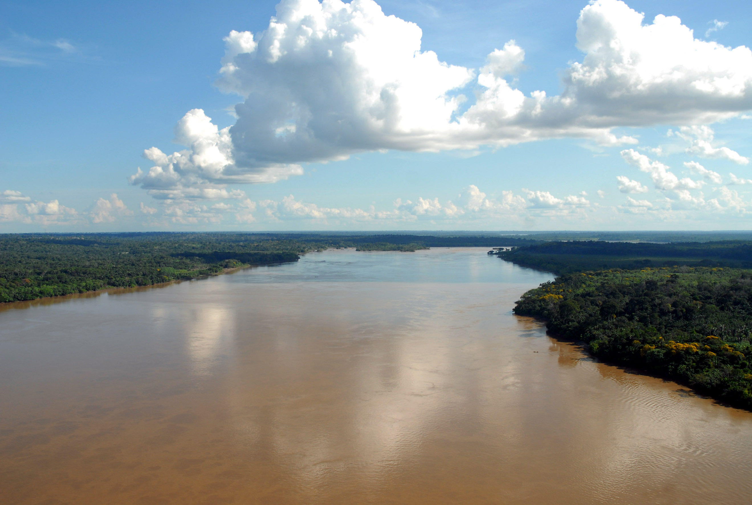 Porto Velho, Rondônia - vista aérea do Rio Madeira, para o qual estão projetadas duas hidrelétricas.